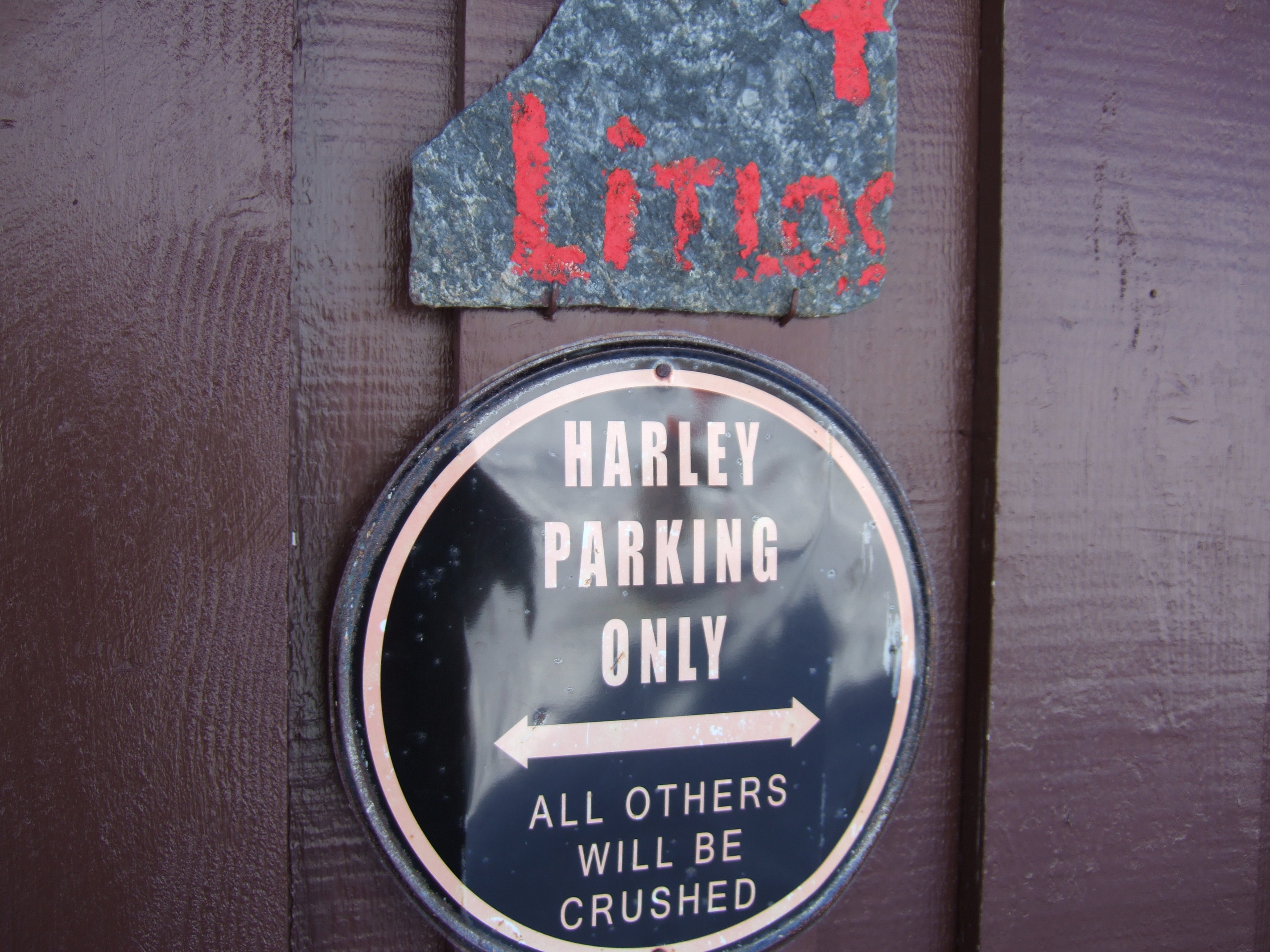 Begrensede muligheter for parkering ved Litlos